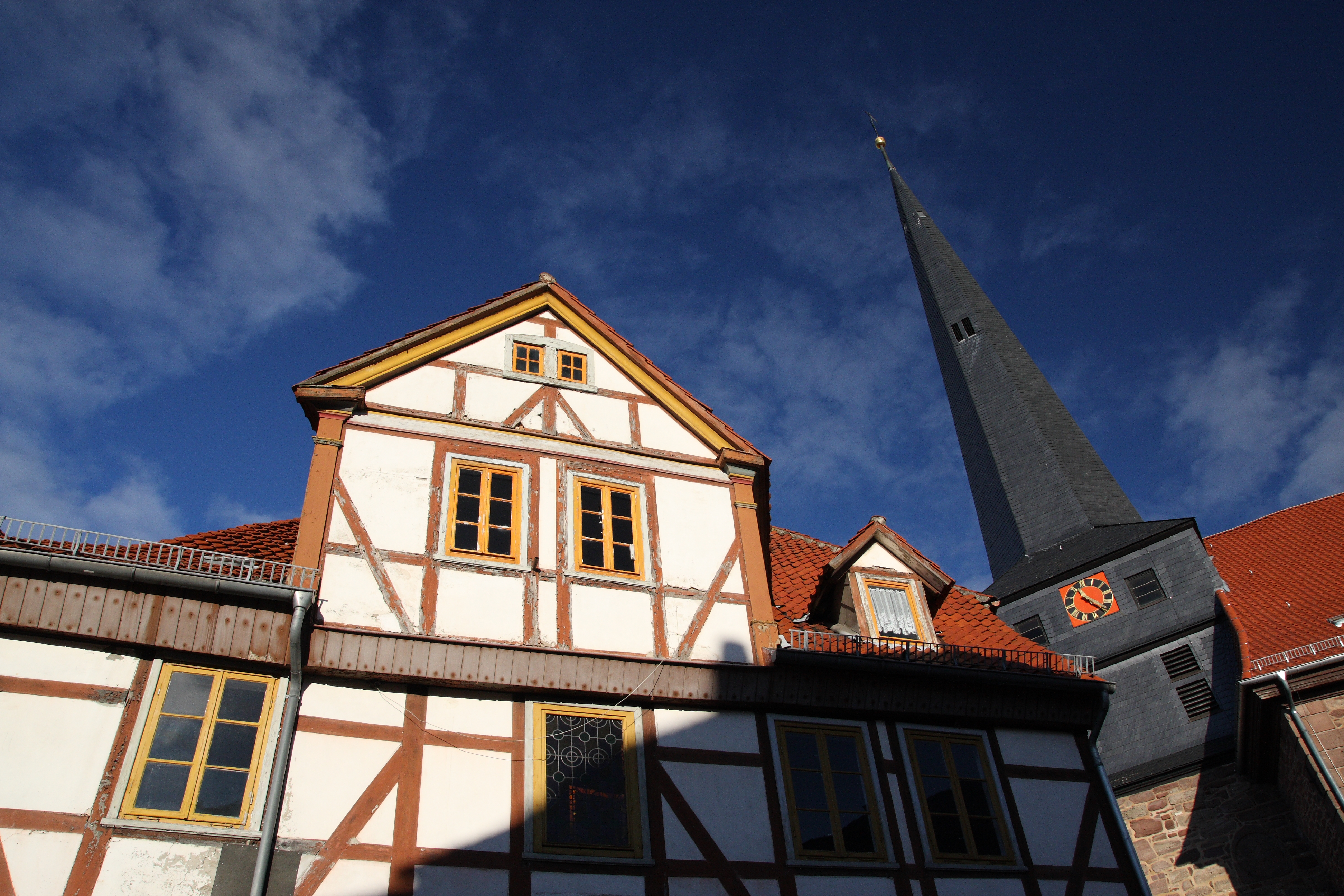 Lindau, Germany